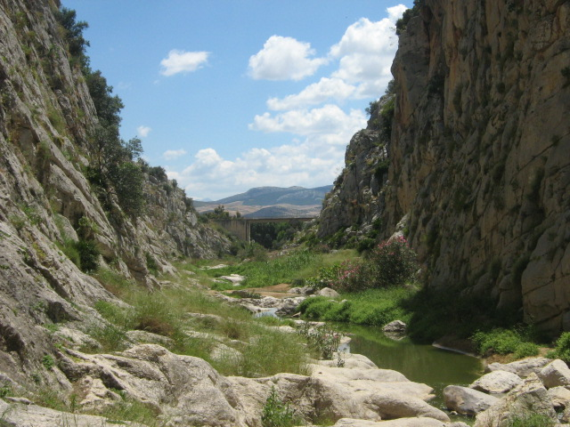 Rio de la Venta